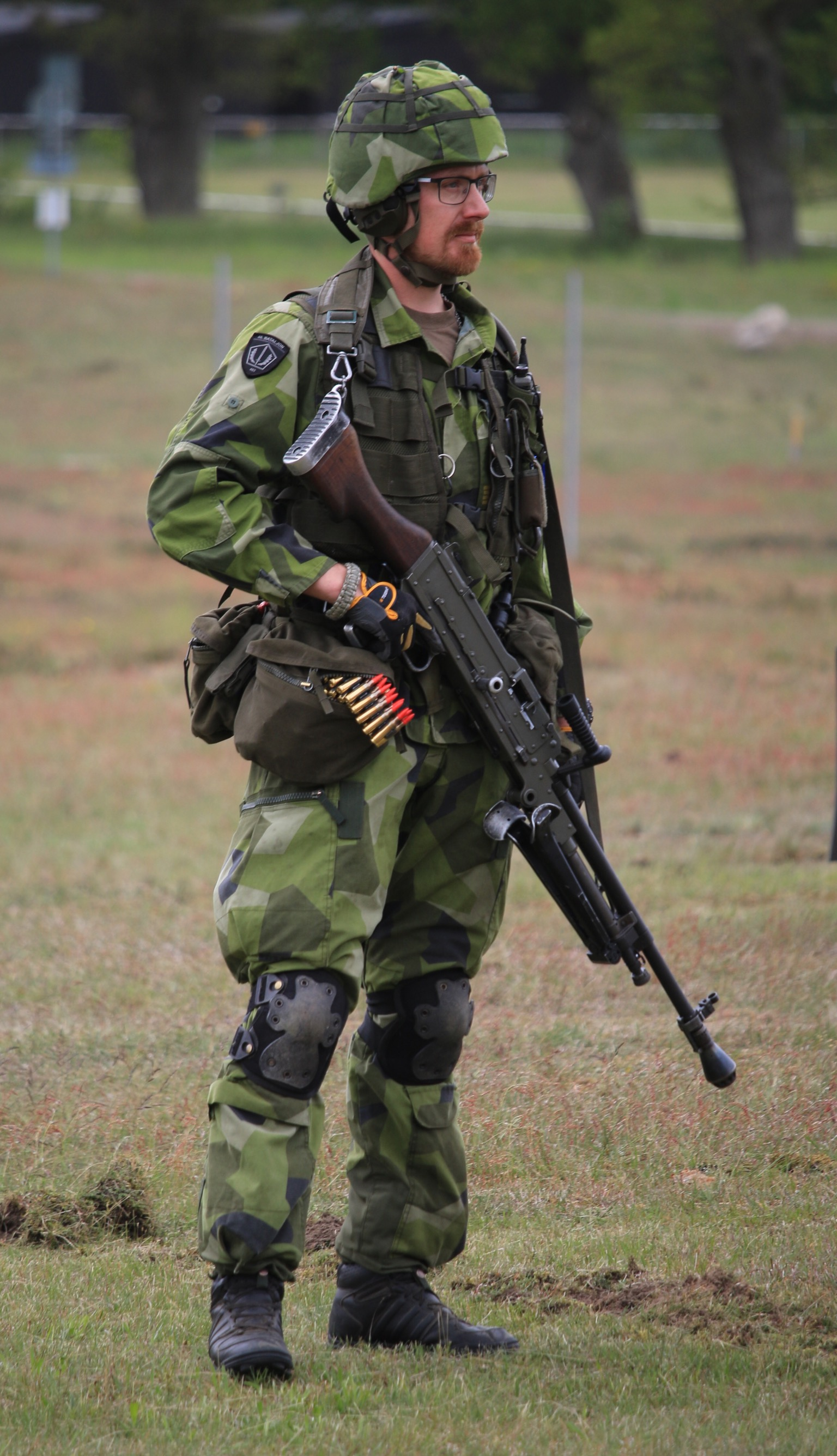 Kulspruta m58 Revinge 2019